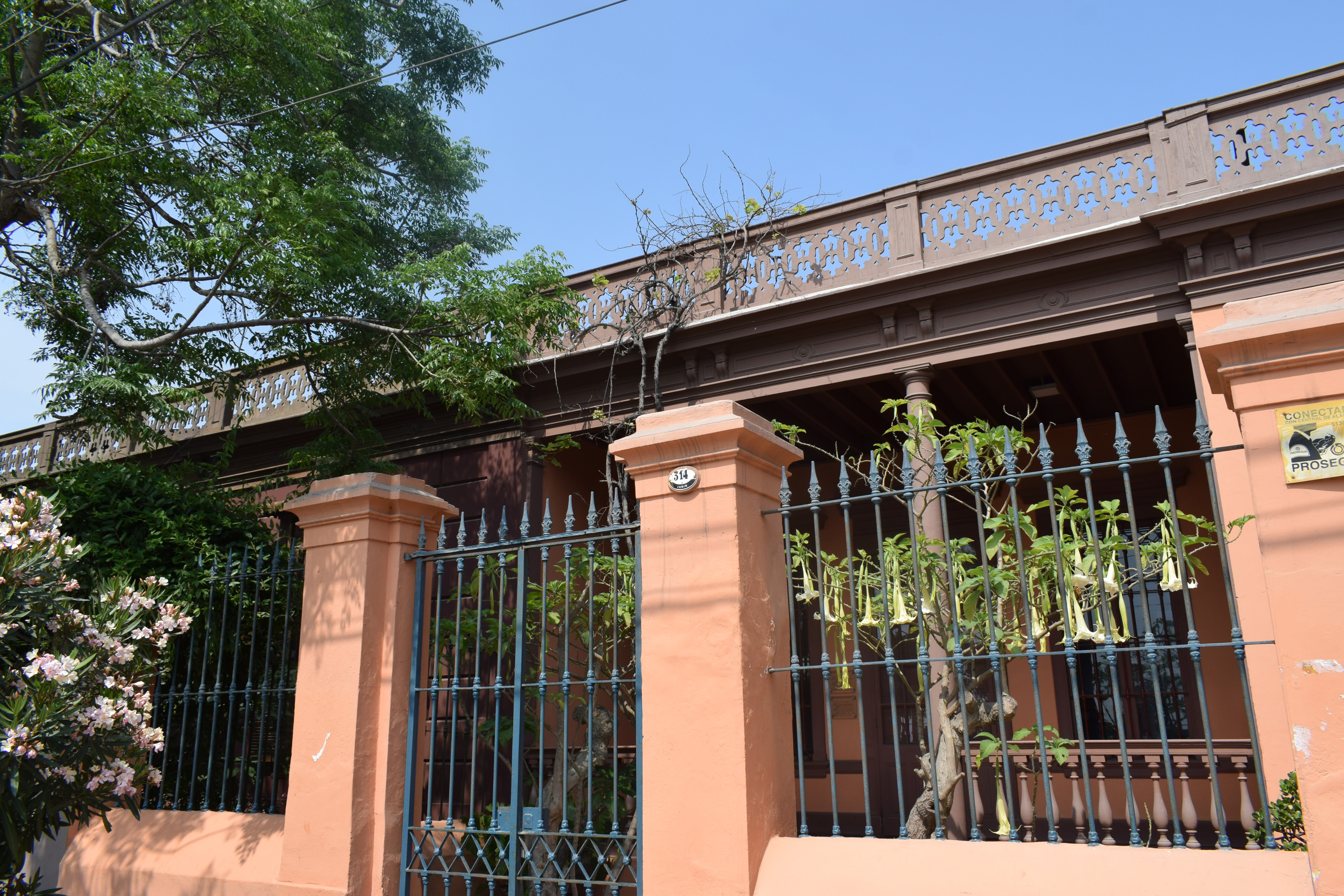 Local administrativo del IFEA en Barranco (Maison Brignardello)